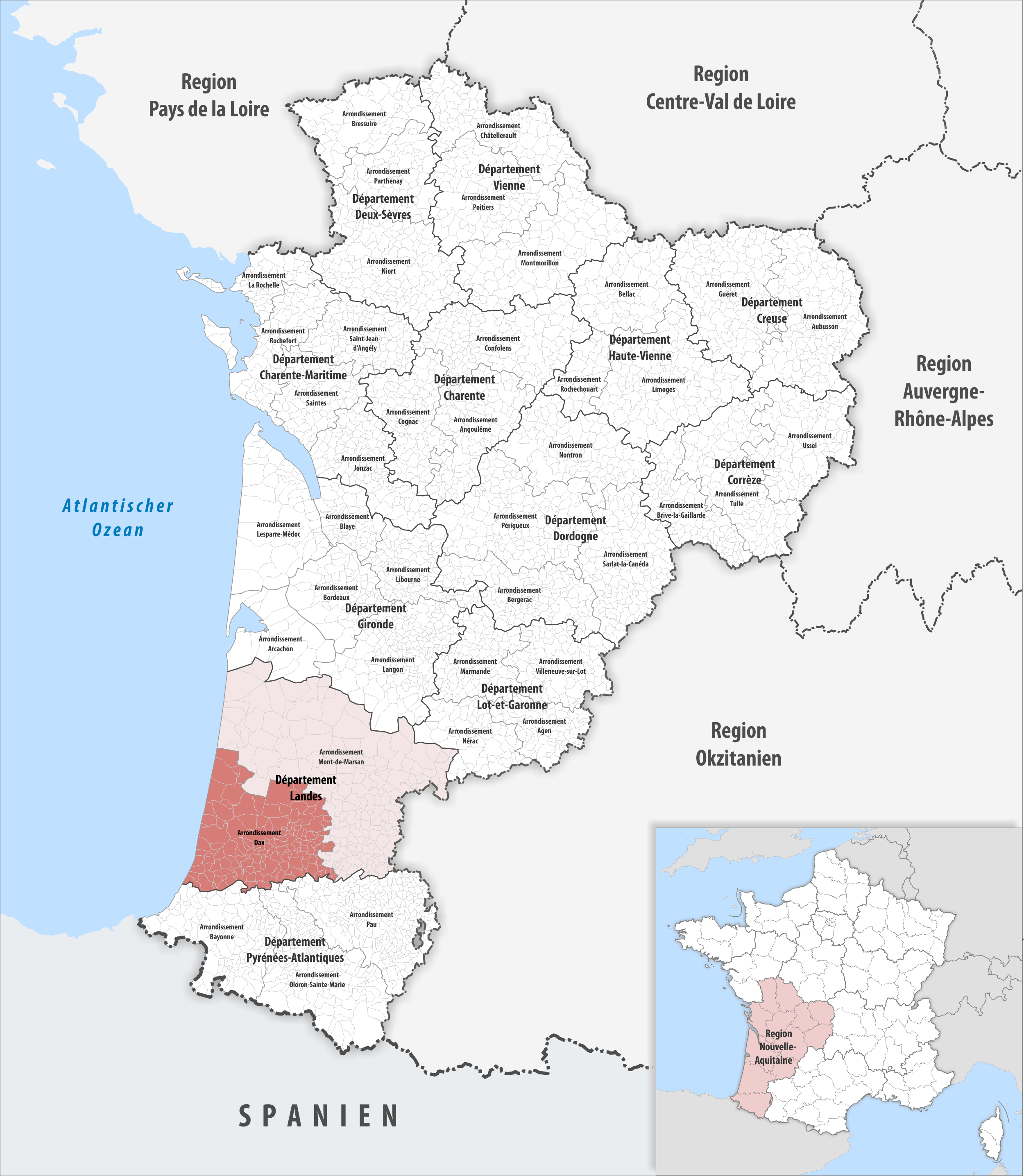 Lage des Arrondissements Dax